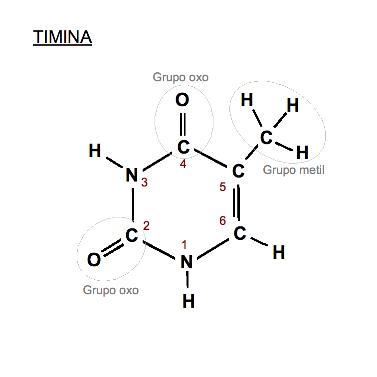 estructura química de la timina